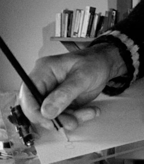 écriture avec le crayon orienté plus haut que la ligne d'écriture